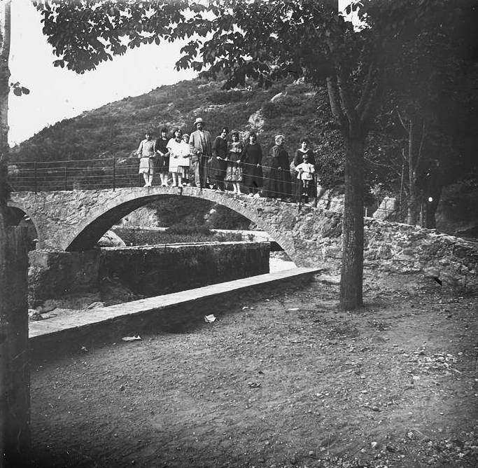 Al pont de Tagartet. Josep Salvany i Blanch (1918)